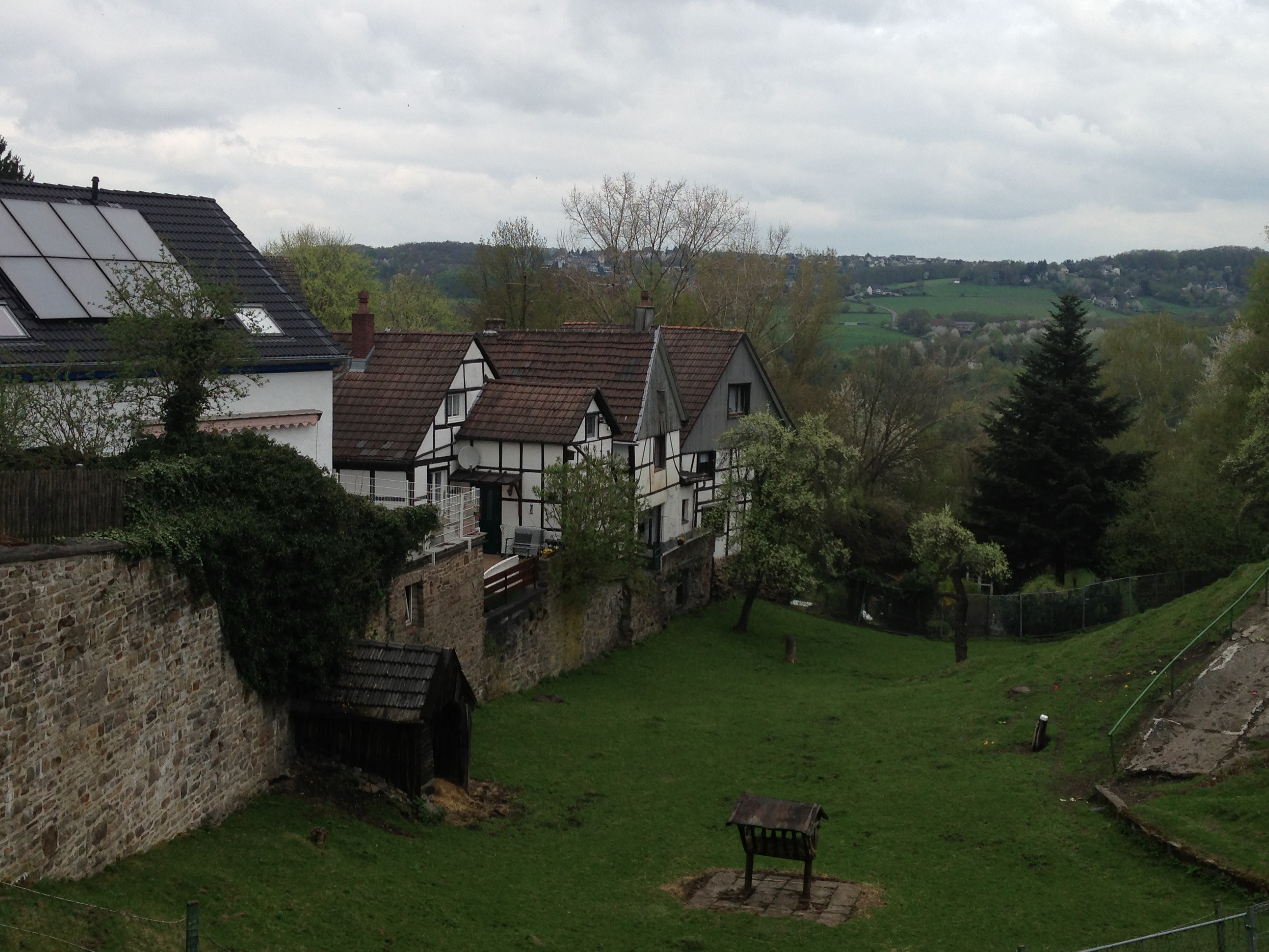 Freiheit Blankenstein an der Burg Blankenstein, Hattingen-Blankenstein